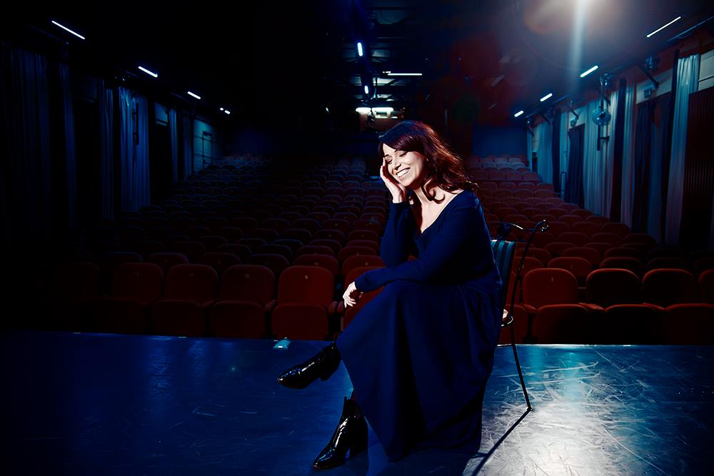 Katarzyna Pakosińska